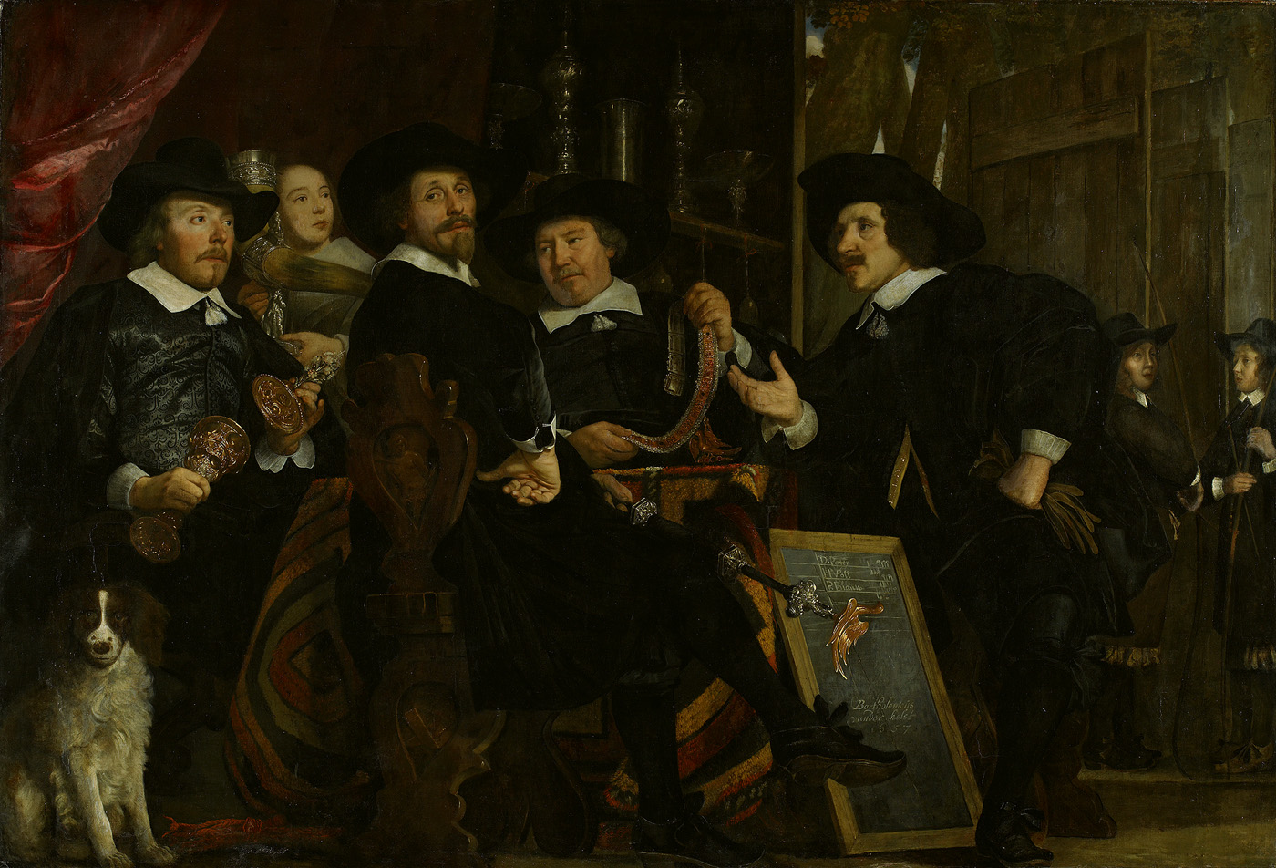 schilderij; Handboogdoelen; portret; groepsportret; regentenstuk; Banninck Cocq, Frans; Poll, Jan van de (1721-1801); Pater, Albert Dircksz.; Blaeu, Dr. Joan Willemsz.